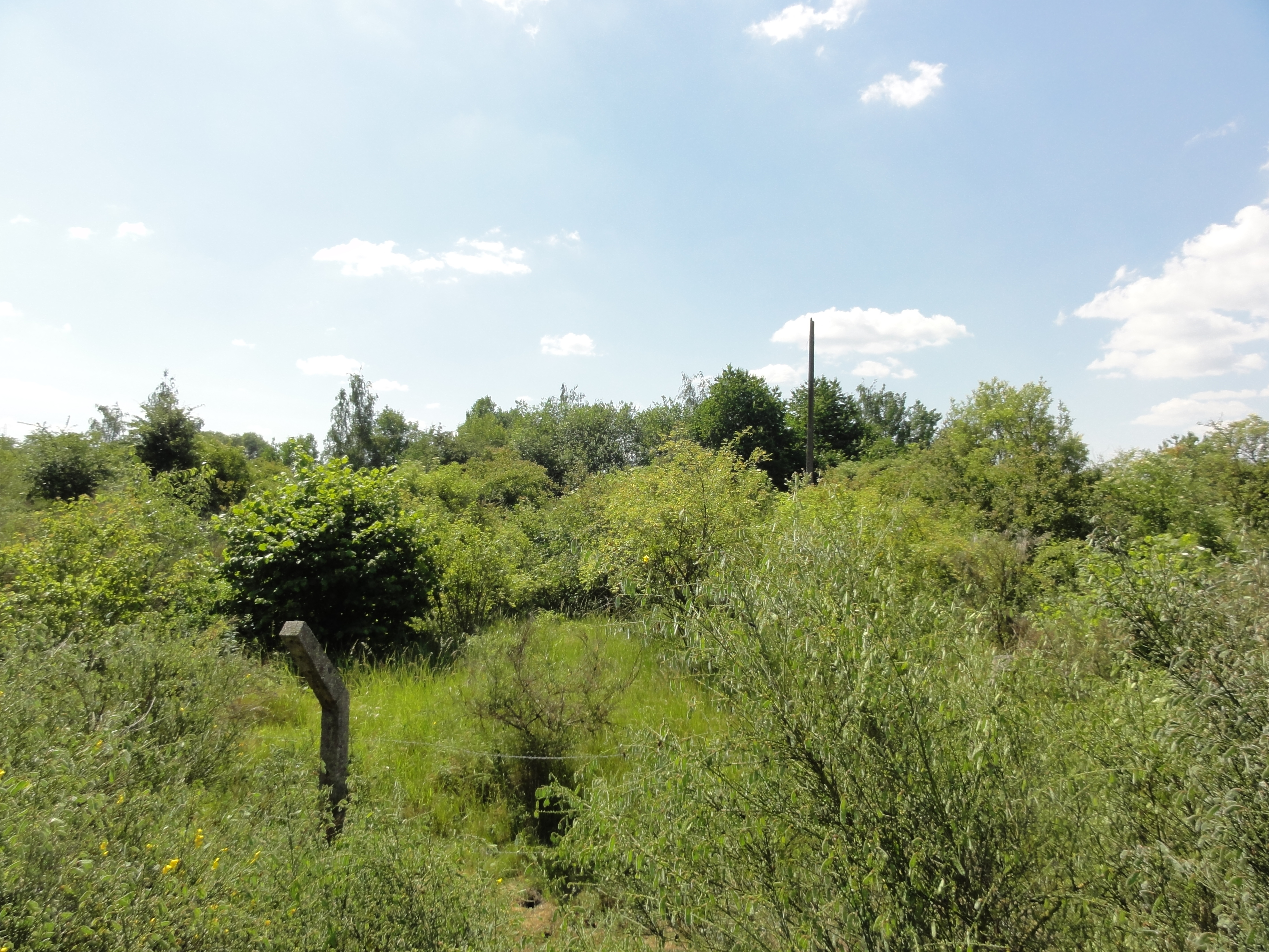 Terril n° 134 dit Camp de la Centrale Est, Centrale de Dechy du Groupe de Douai, Sin-le-Noble, Nord, Nord-Pas-de-Calais, France.